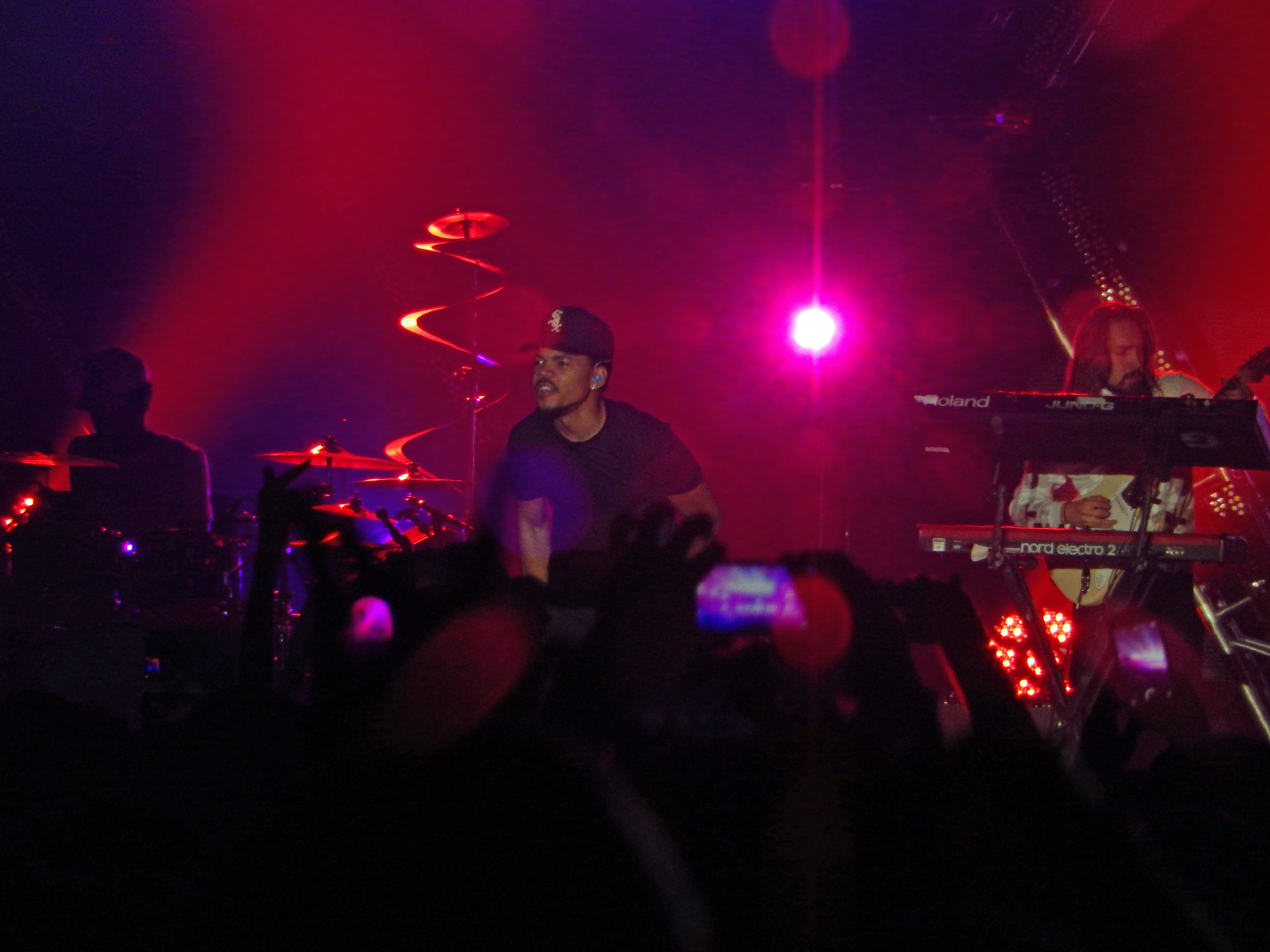 Американский хип-хоп исполнитель Chance the Rapper